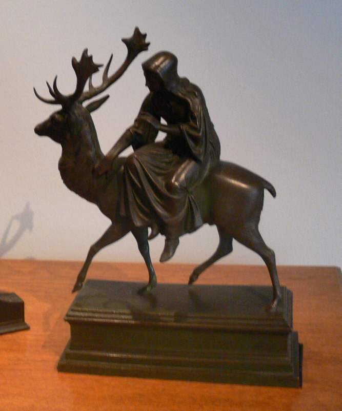 Christian Daniel Rauch: Jungfer Lorenzen von Tangermünde, Eisengießerei, Preußen um 1830 Kunstgewerbemuseum Berlin, Inv. Nr. 1916,132